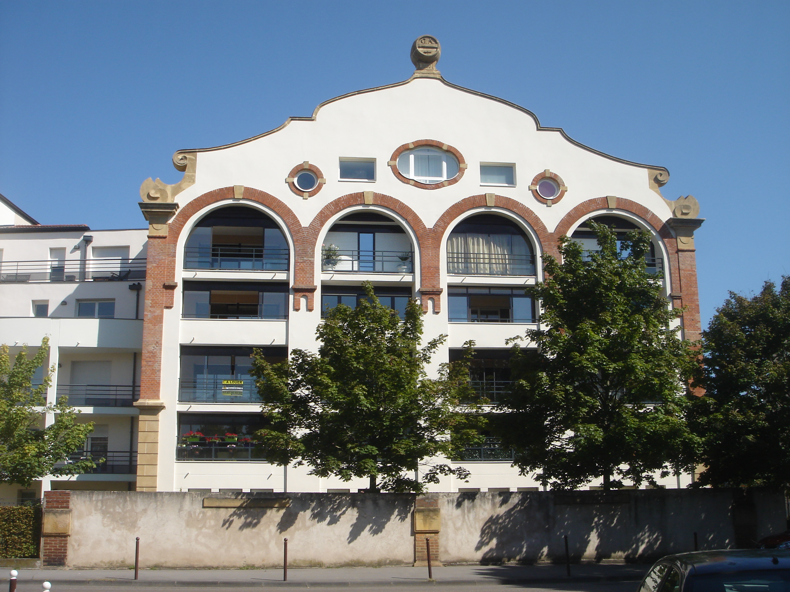 La façade du bâtiment (n°36) avait été conservée et rénovée.